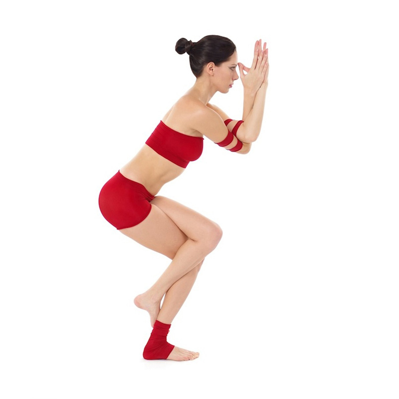 Garudasana by Nina Mel, Yoga Teacher